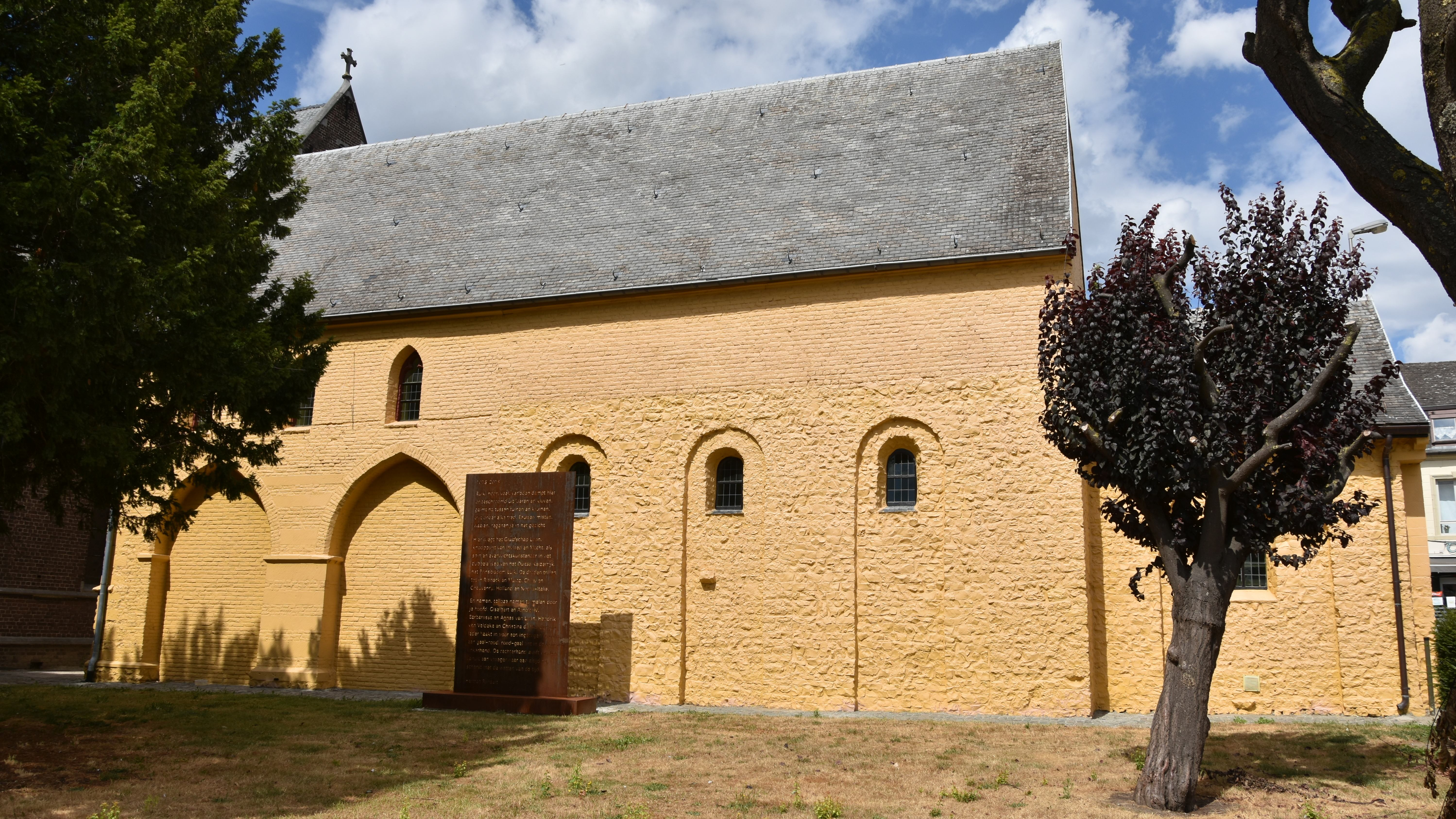 Graethemkapel Borgloon 10-08-2018 14-35-40 This photo of immovable heritage has been taken in the Flemish Region